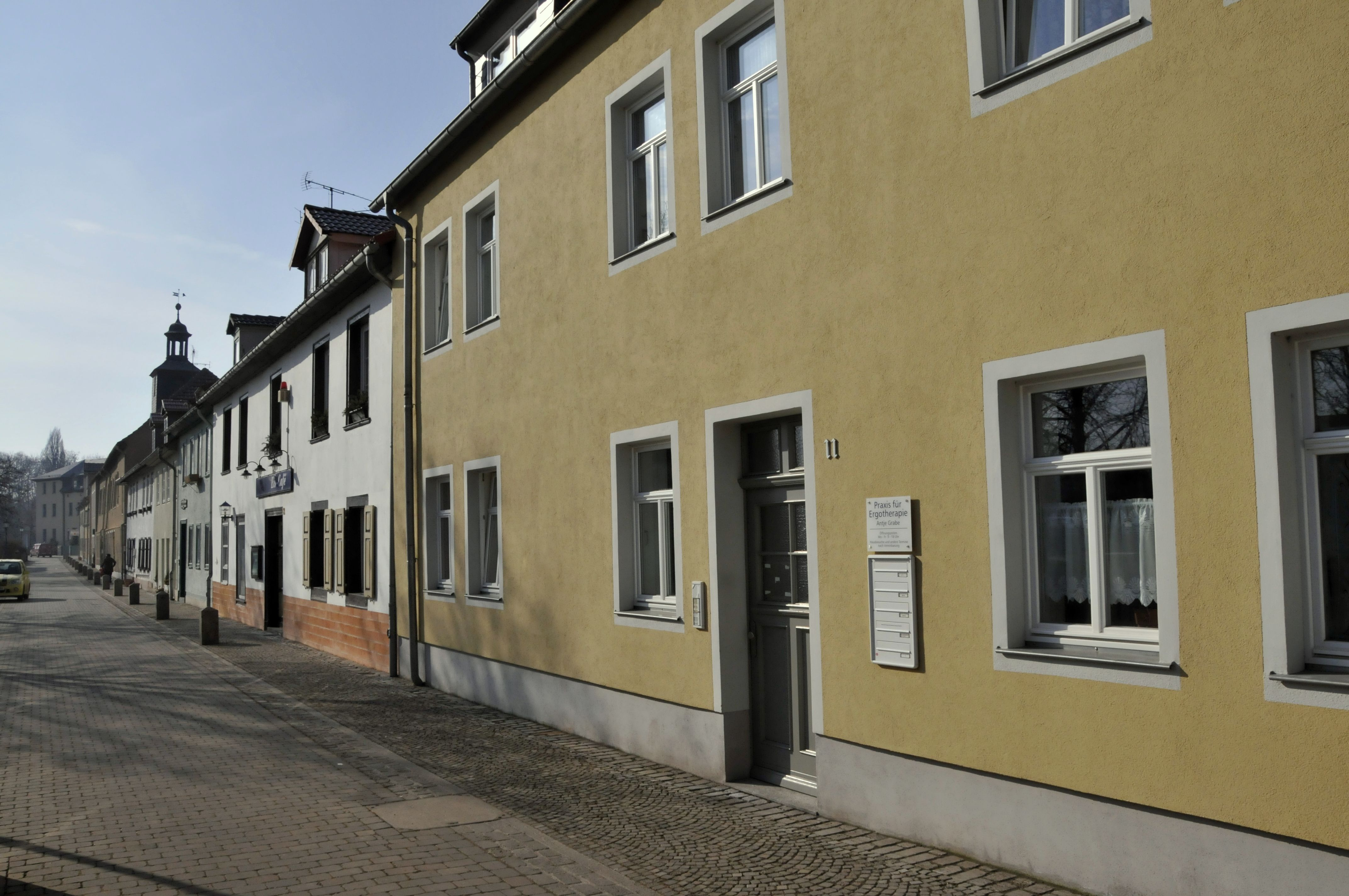 Neudietendorf, Zinzendorfstr.